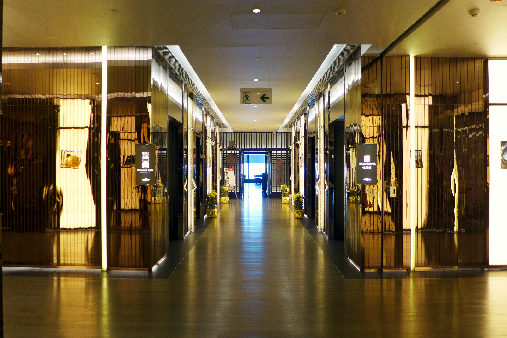 Skydining 101 Lobby